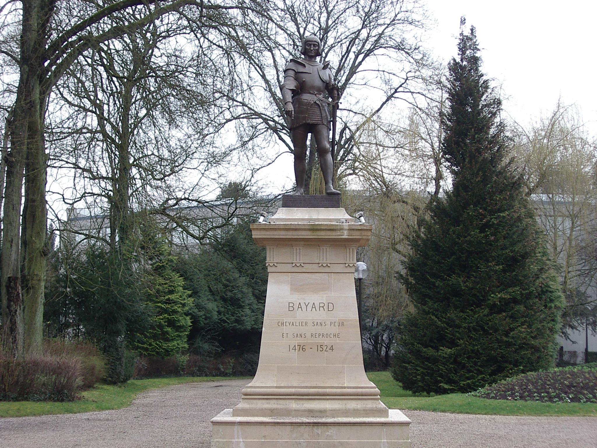 Statue du Chevalier Bayard par Aristide Croisy, à Charleville-Mézières, dans les Ardennes, en France